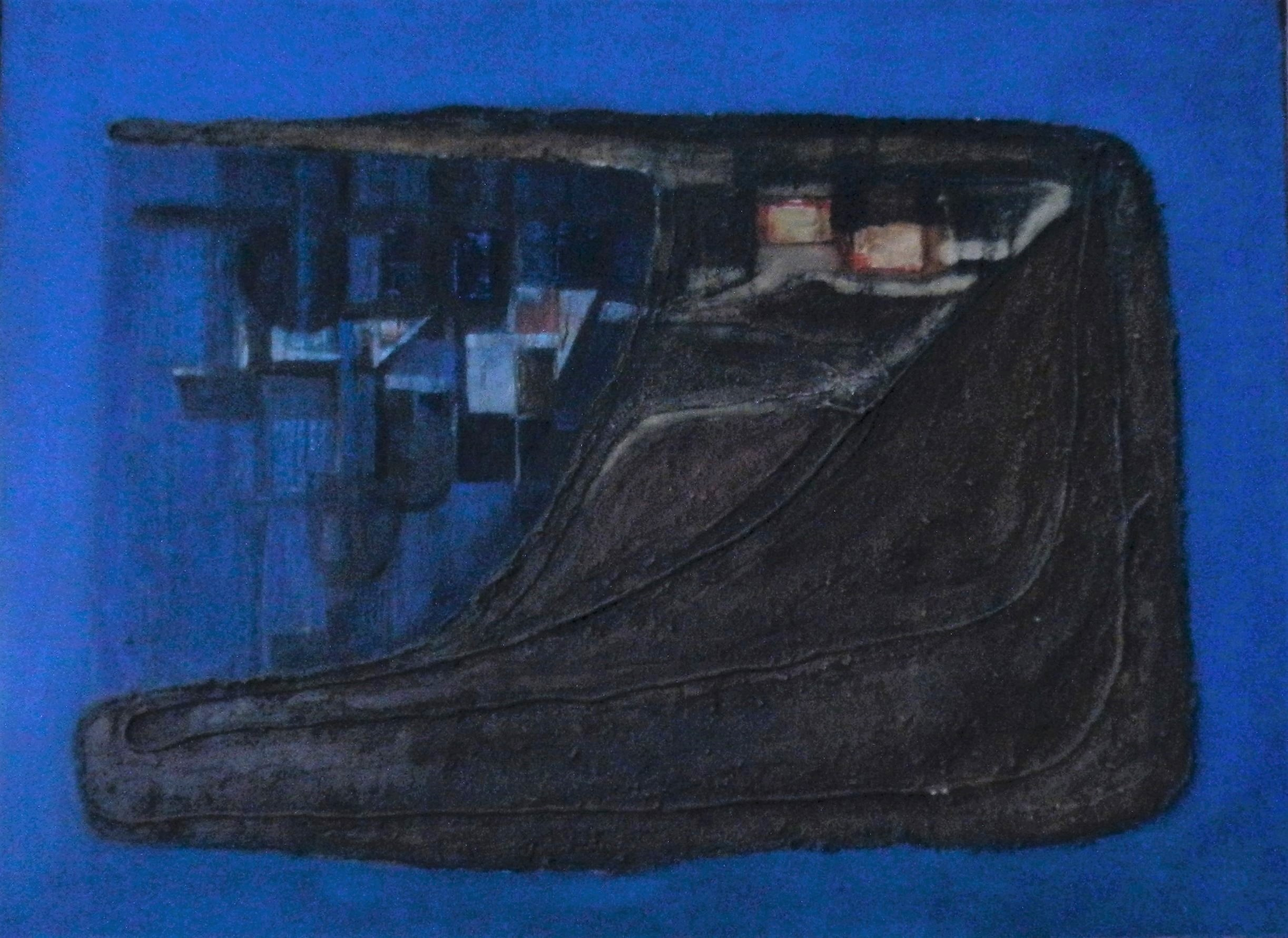 olejomalba cca 150 x 120 cm z roku 1962